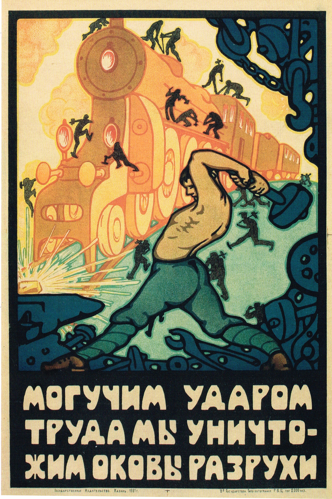 Владимир Владимирович Кудряшев (25 июля 1902, Малые Яльчики Казанской губернии, Российская империя – 09 ноября 1944, Москва). График, скульптор, живописец